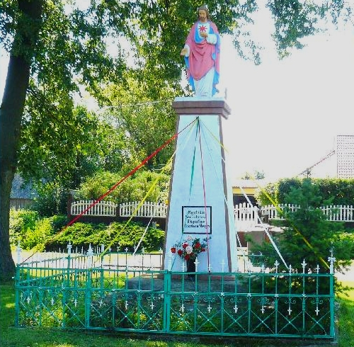 Figurka w Drachowie